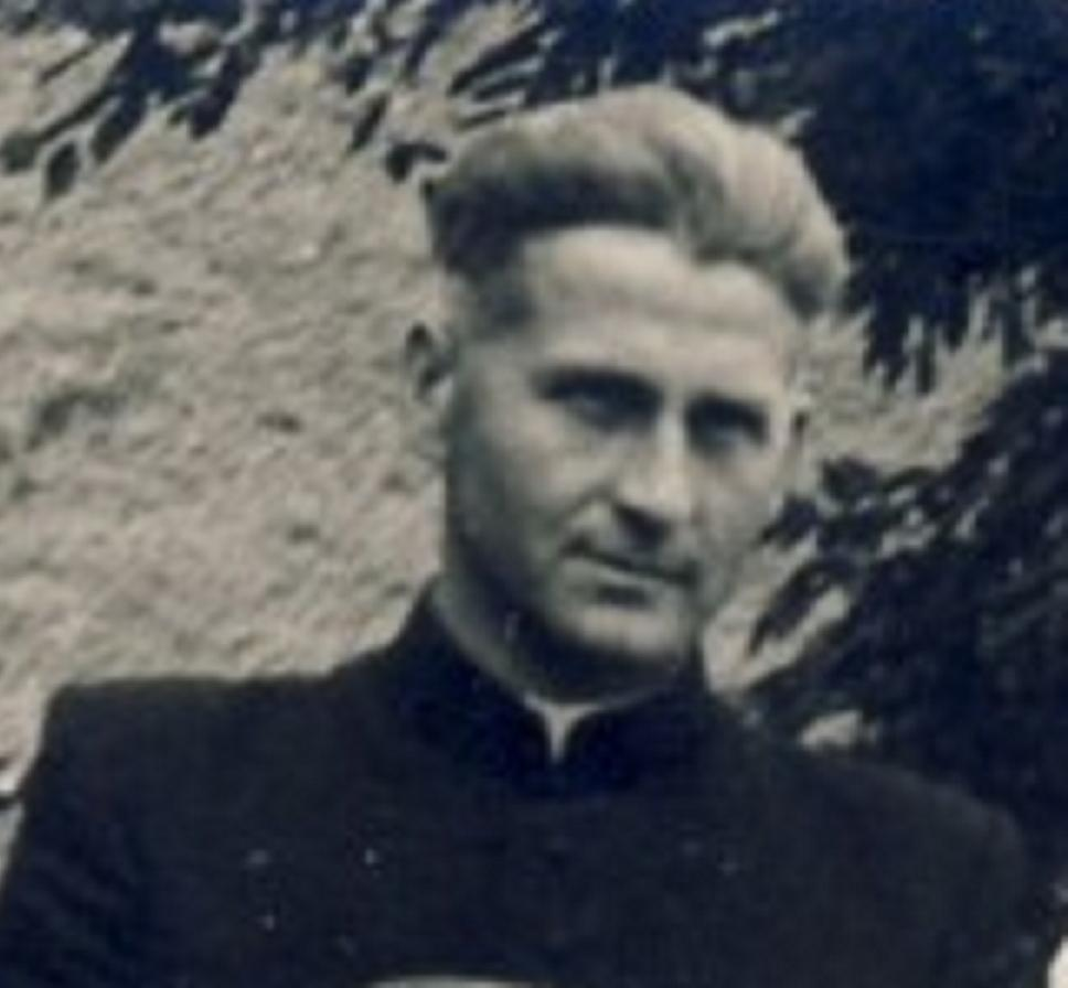 Ksiądz Ludwik Rutyna